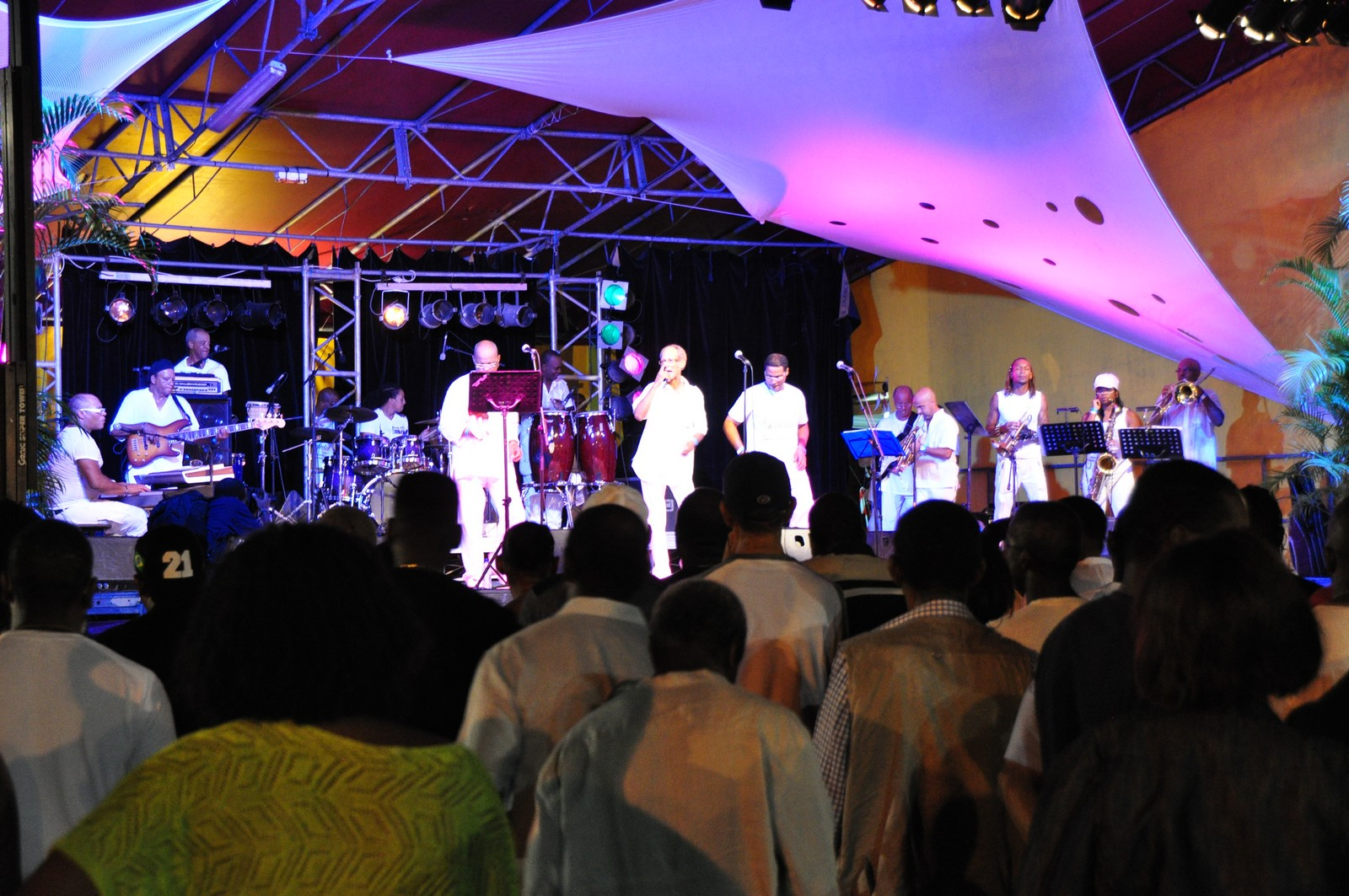 La Perfecta sur scène, au Lamentin en Martinique, le 13 août 2011